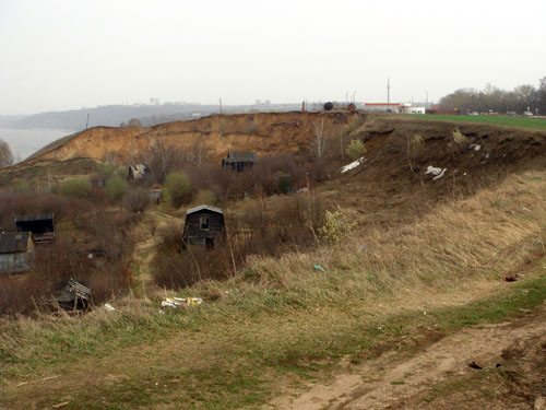 Оползень у посёлка Новинки Богородского района Нижегородской области.